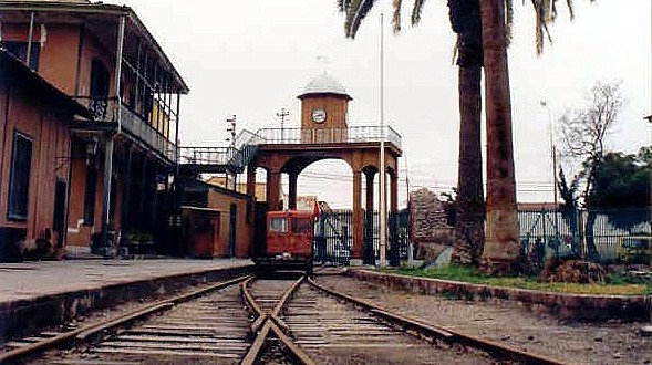 Estación FFCC Tacna-Arica (Tacna)